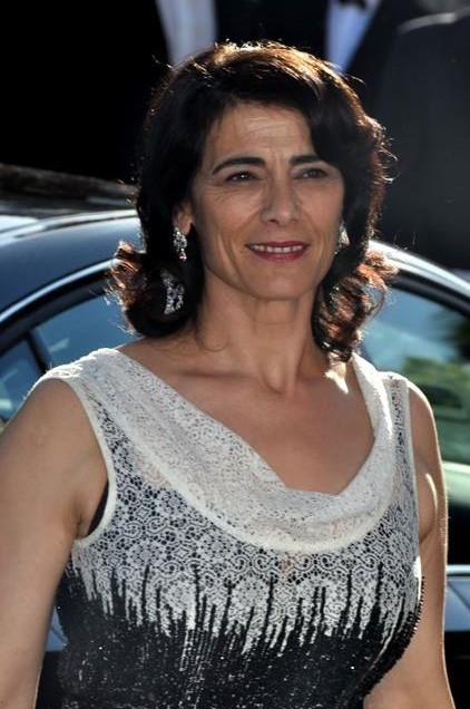 Hiam Abbas au festival de Cannes